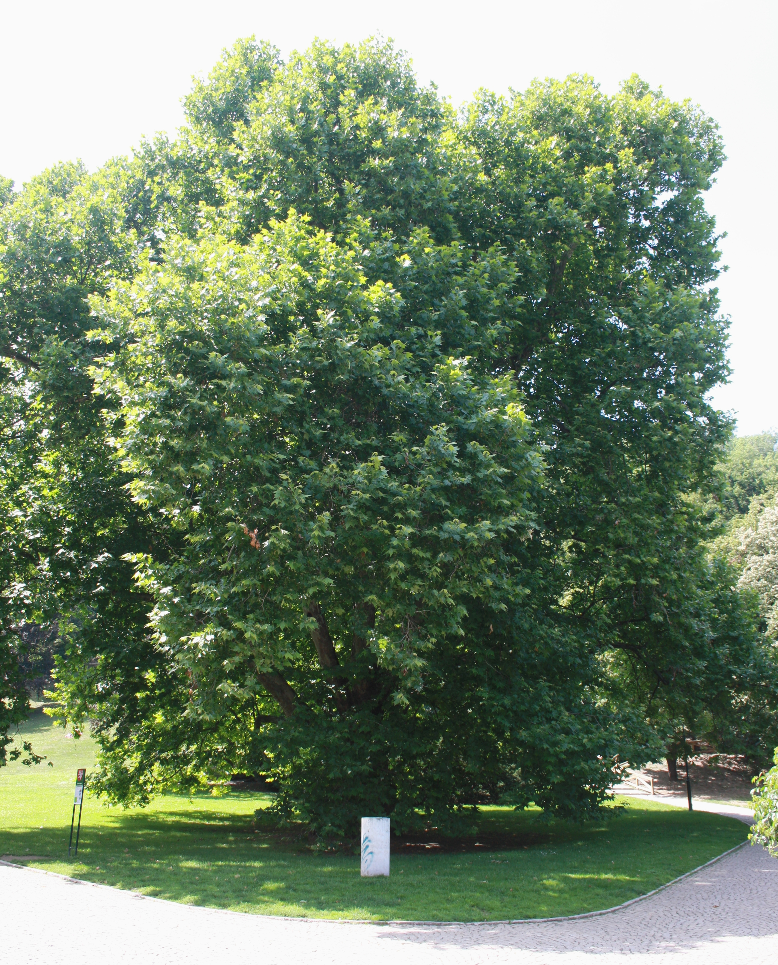 Památný platan javorolistý v Kinského zahradě v Praze na Smíchově